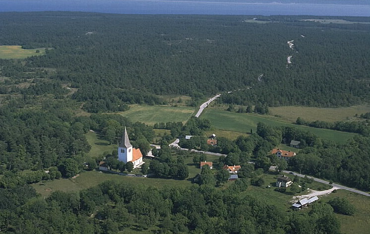 Halls kyrka Motiv: Hall Nyckelord: Flygbilder, Riksintressen Kategori: KyrkomiljöHalls kyrka.